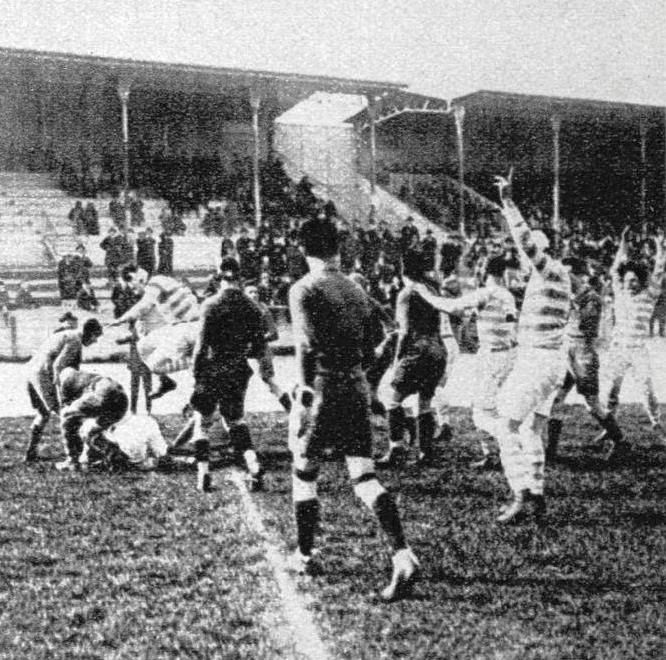 923 (mars), victoire à Paris du T.O.E.C (rayé). contre le Stade français (sombre), 0-3.